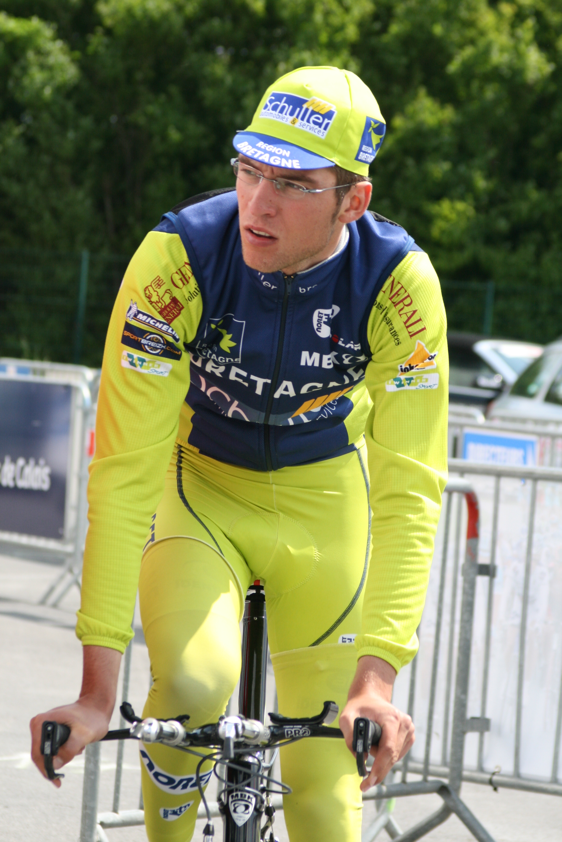 Nicolas Hartmann, durant les Quatre jours de Dunkerque